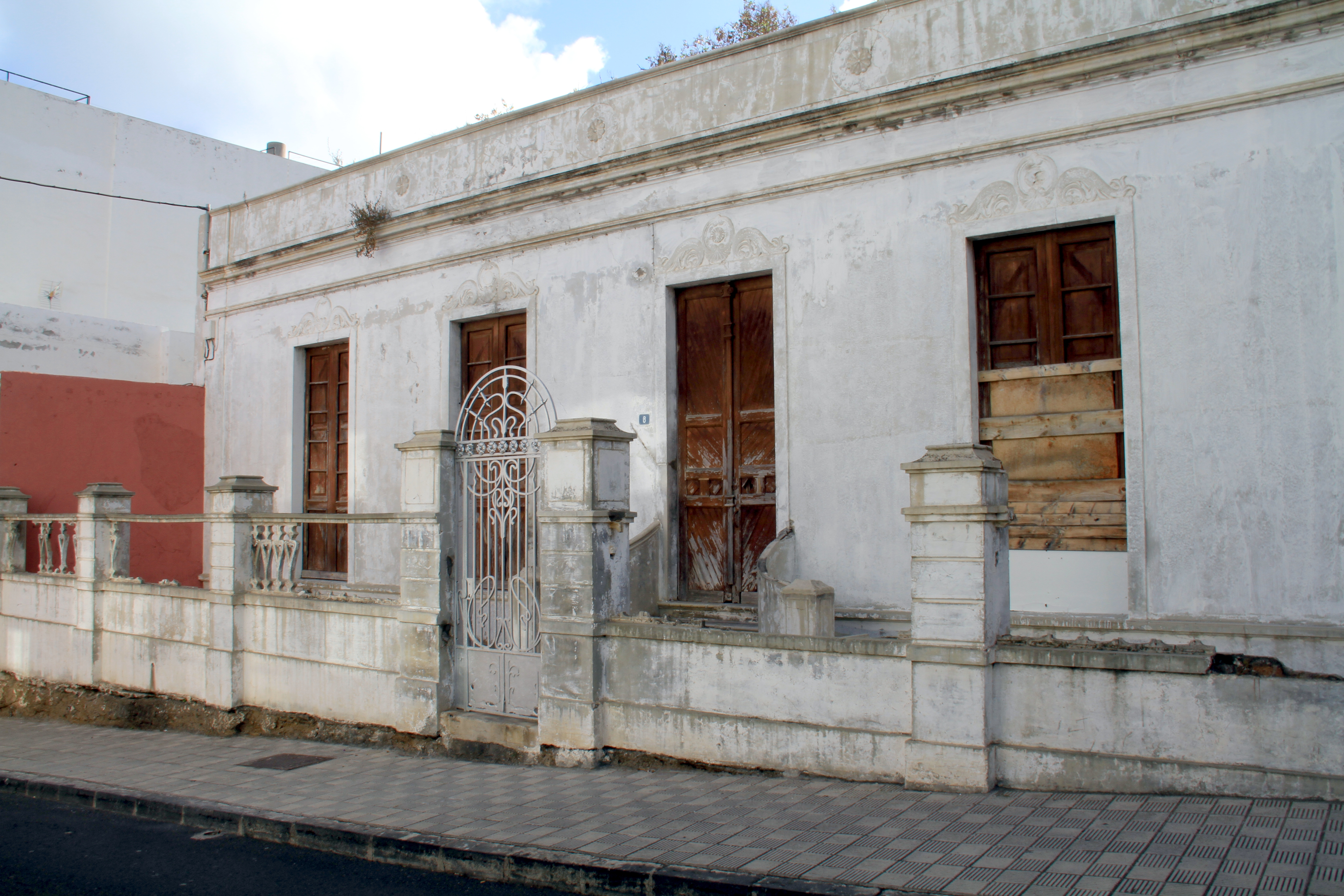 Residencia de Agustín Espinosa García Estrada, en Los Realejos (frontal). (Fotografía: Héctor García Suárez)